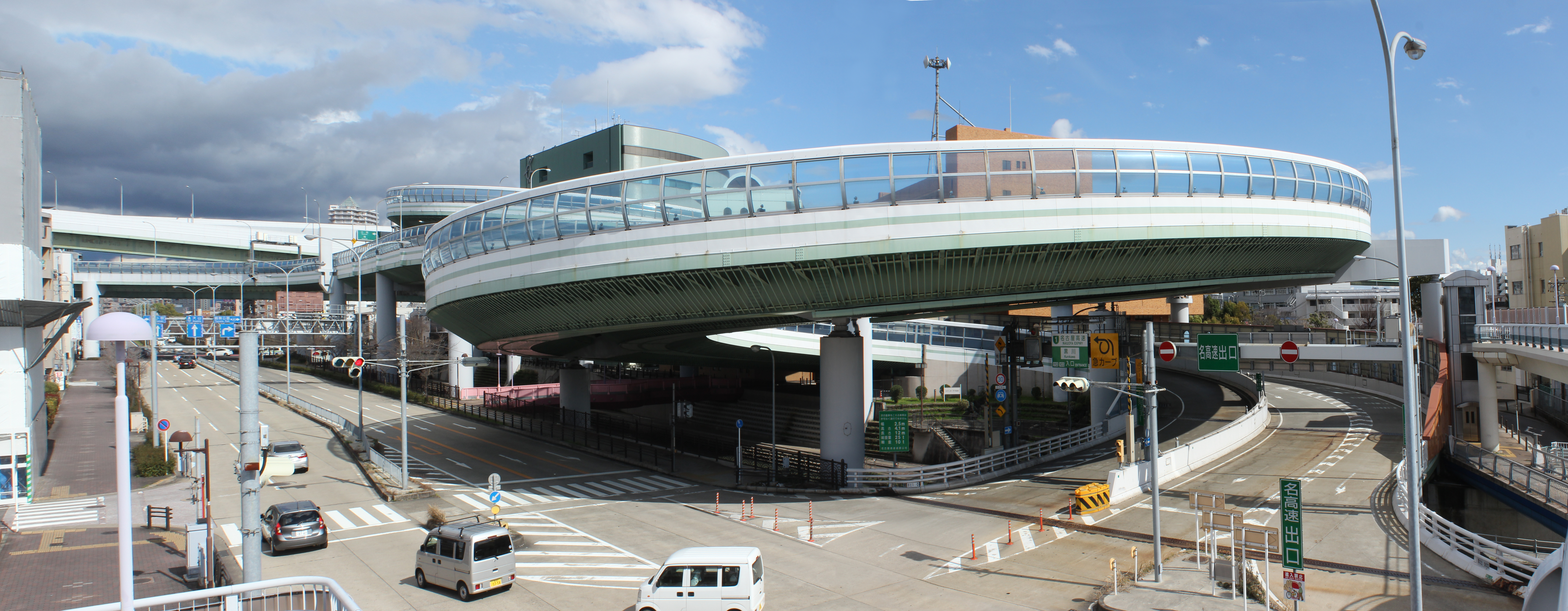 名古屋高速 黒川フルセットランプ（2枚から成る合成写真）